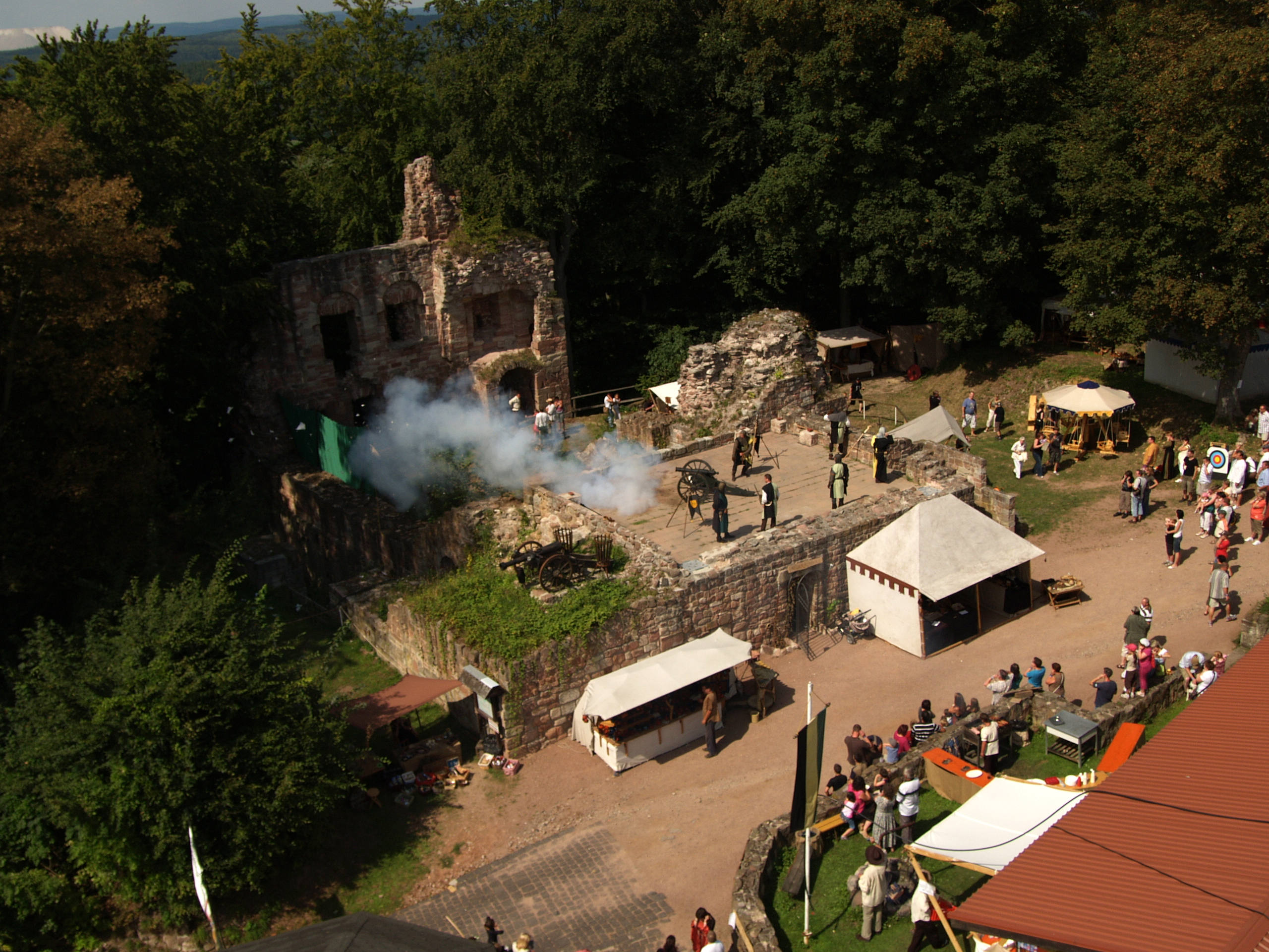 Blick auf den Palas der Krayenburg,Tiefenort, während des 3. Mittelalterlichen Spektakulums mit einem Kanonenschuss der ansässigen Ritterschaft